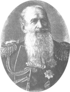 Александр Григорьевич Строганов (1795—1891)